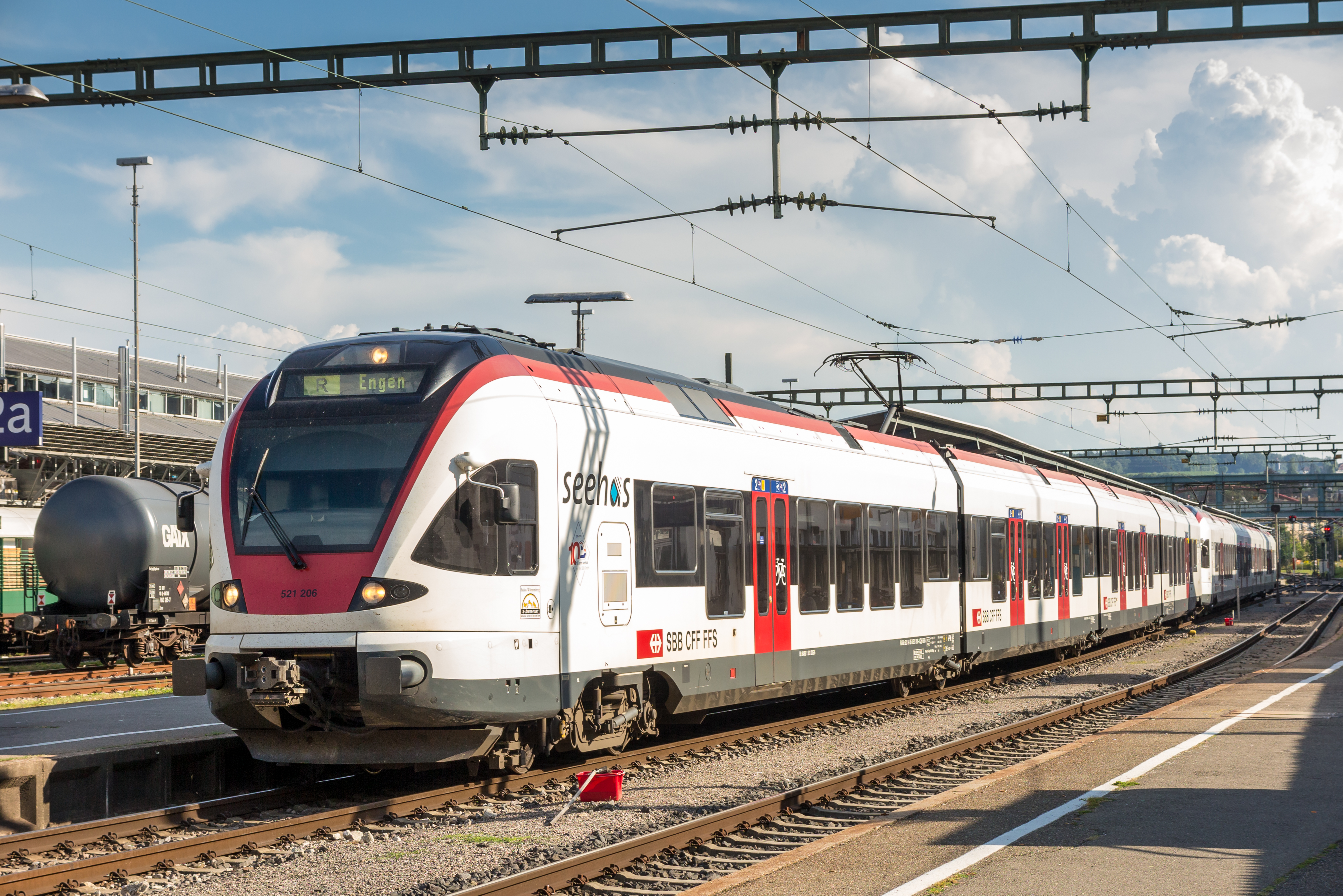 SBB RABe 521 206 auf der "Seehas-Linie" nach Engen abfahrbereit im Hauptbahnhof Konstanz